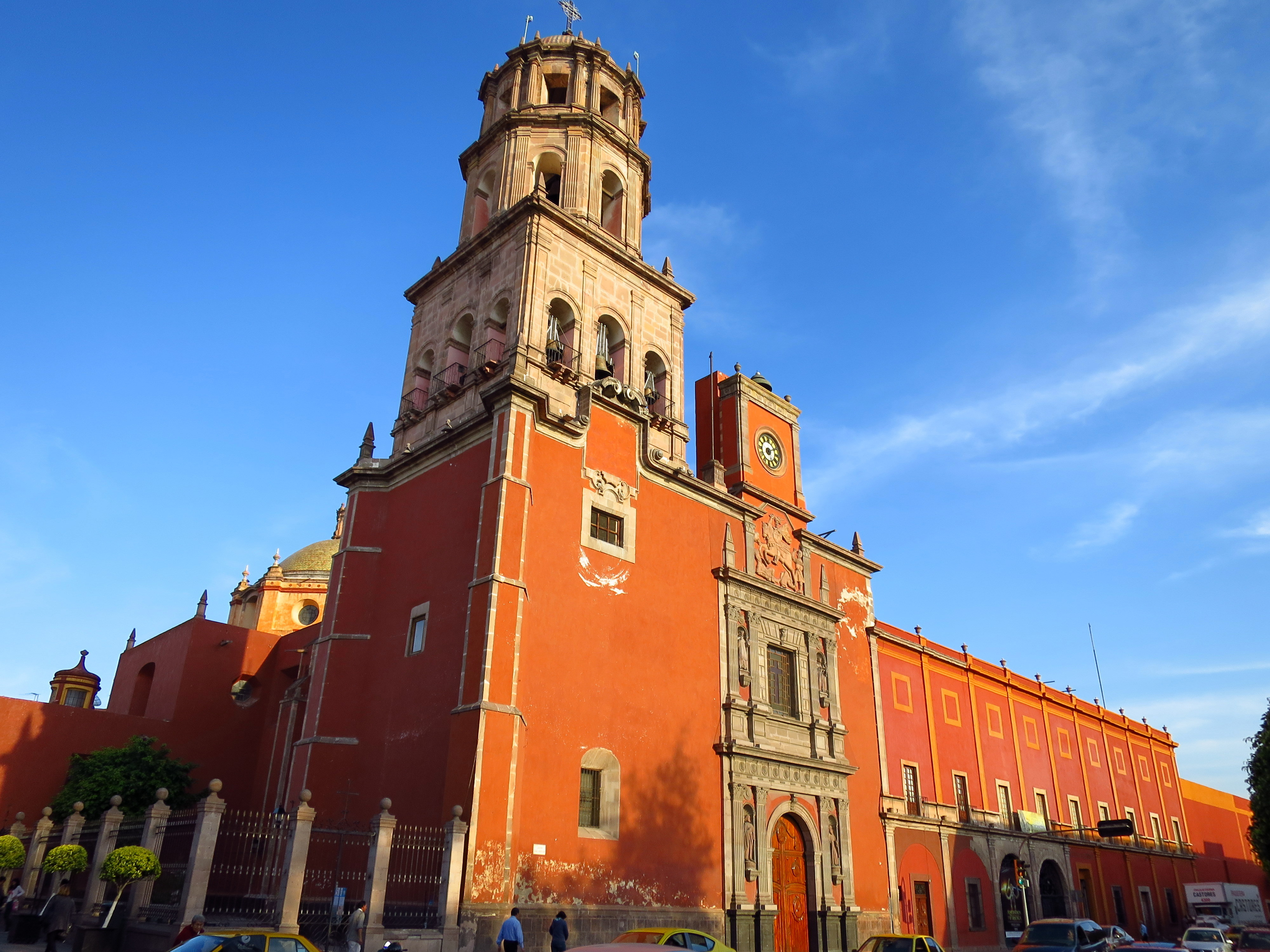 Santiago de Querétaro Centro Historico